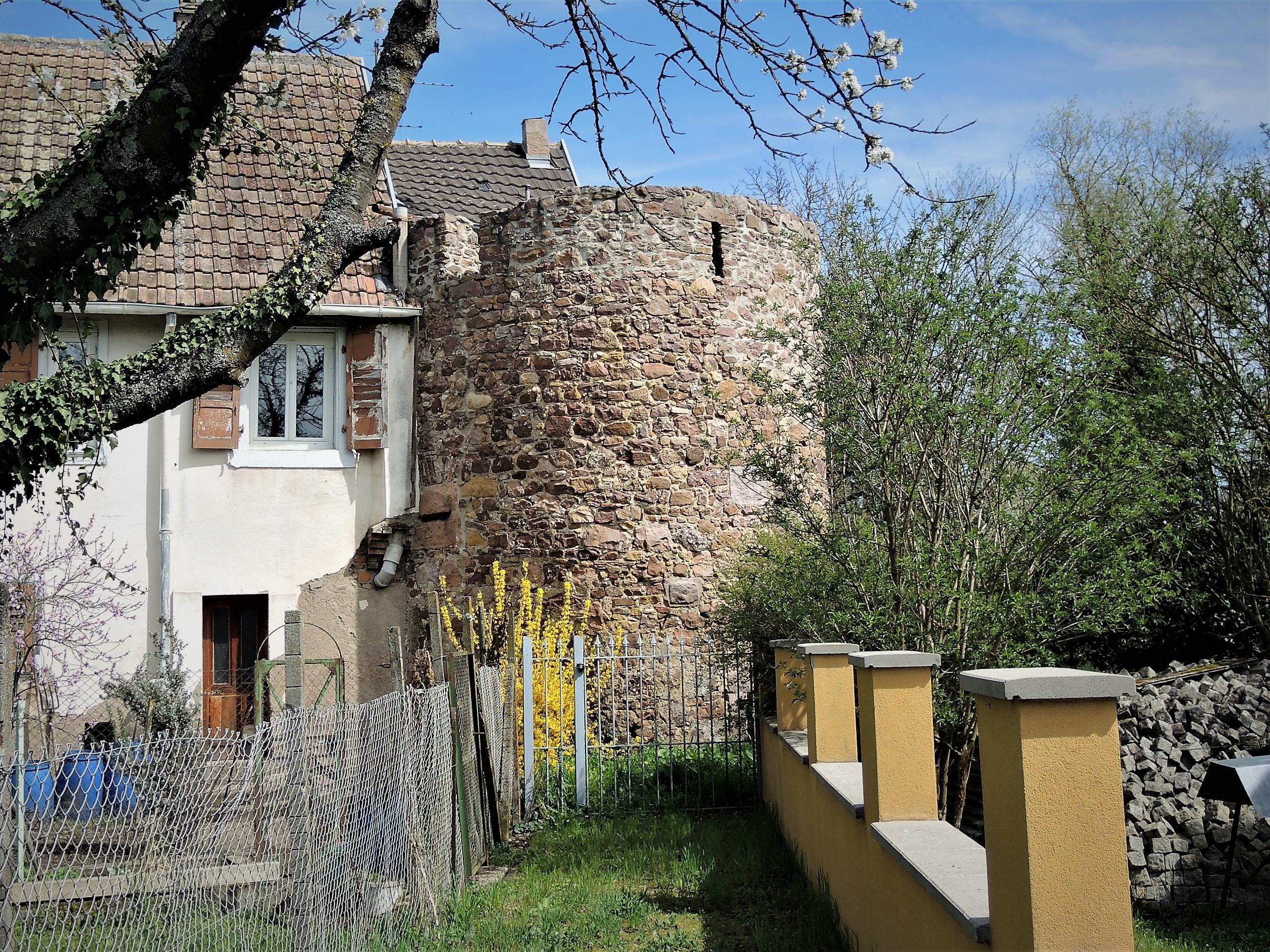 La tour des sorcières. Herrlisheim-près-Colmar. Haut-Rhin